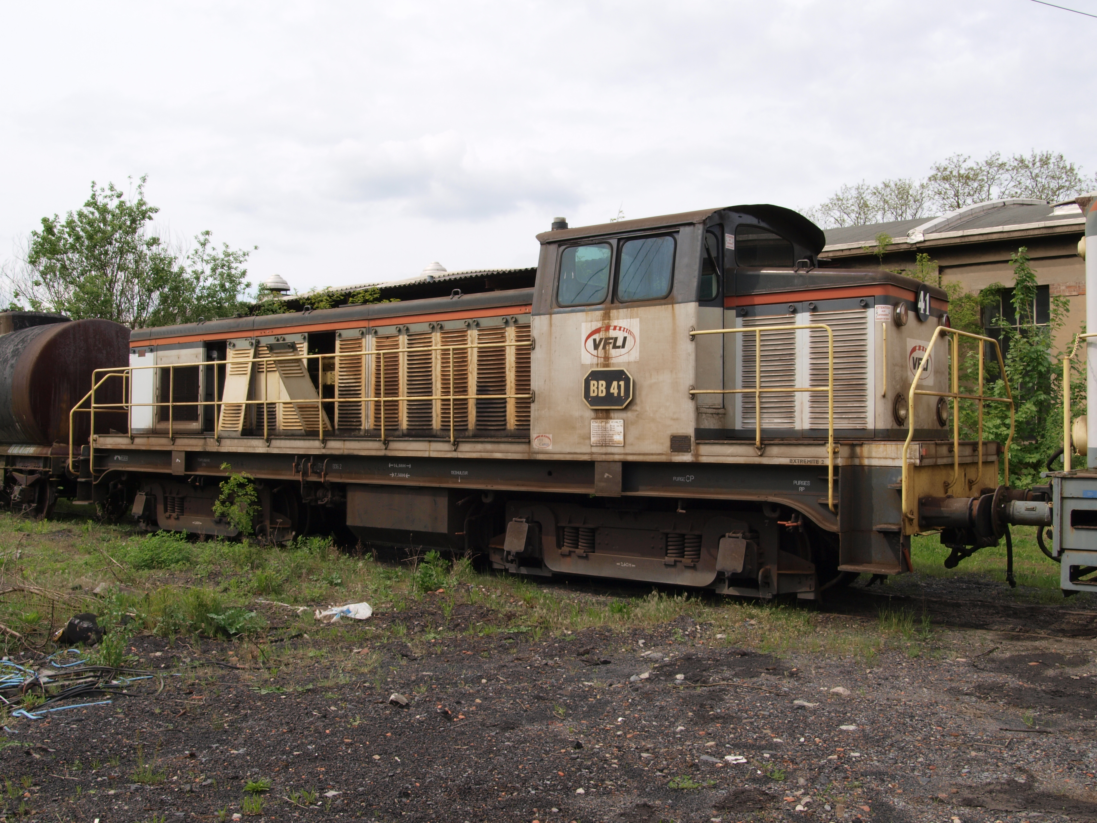 VFLI BB41 diesel locomotive at Petite-Rosselle